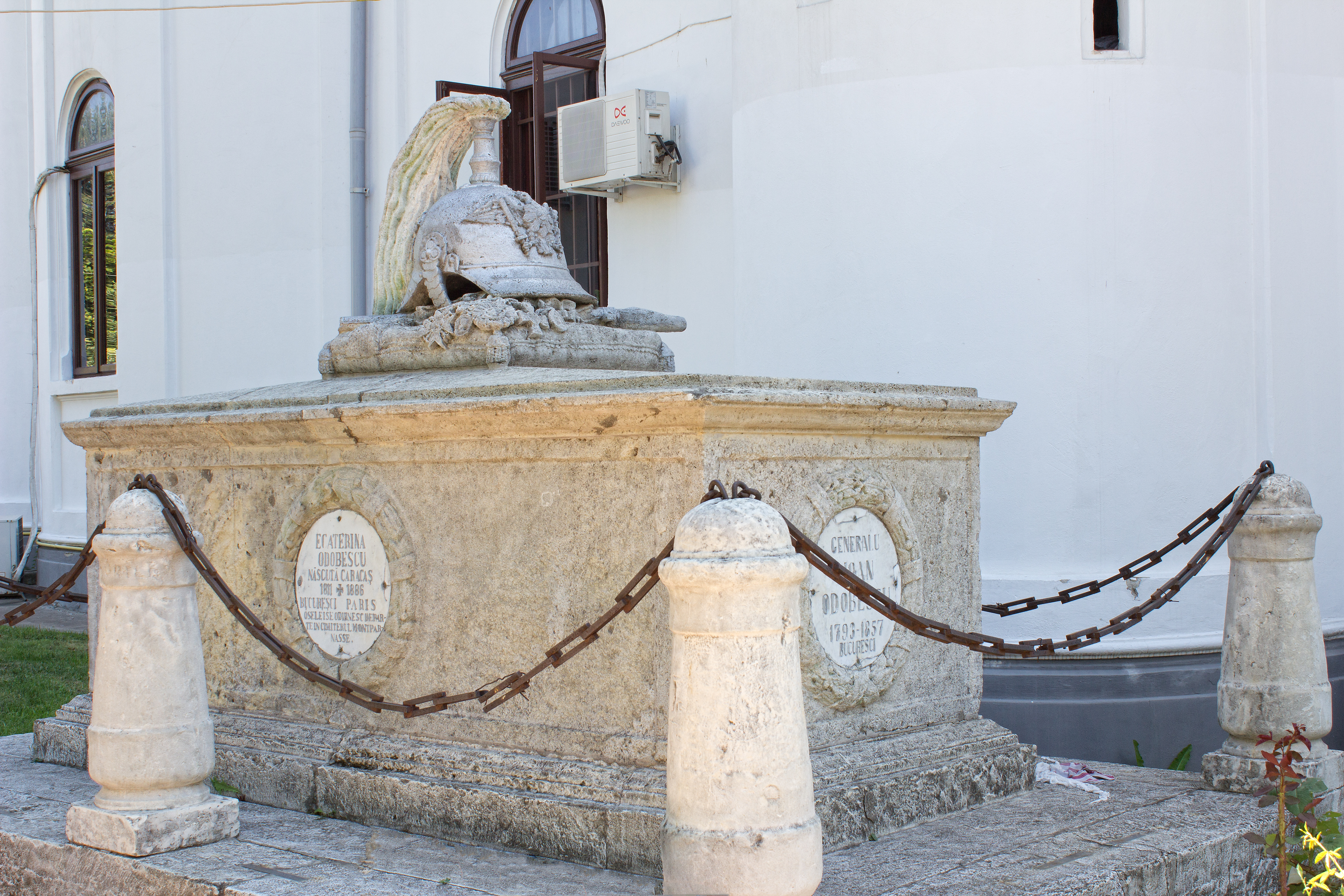 Monumentul funerar al gen. E. Odobescu. - București Str. Icoanei 12 sector 2, în curtea Bisericii Icoanei